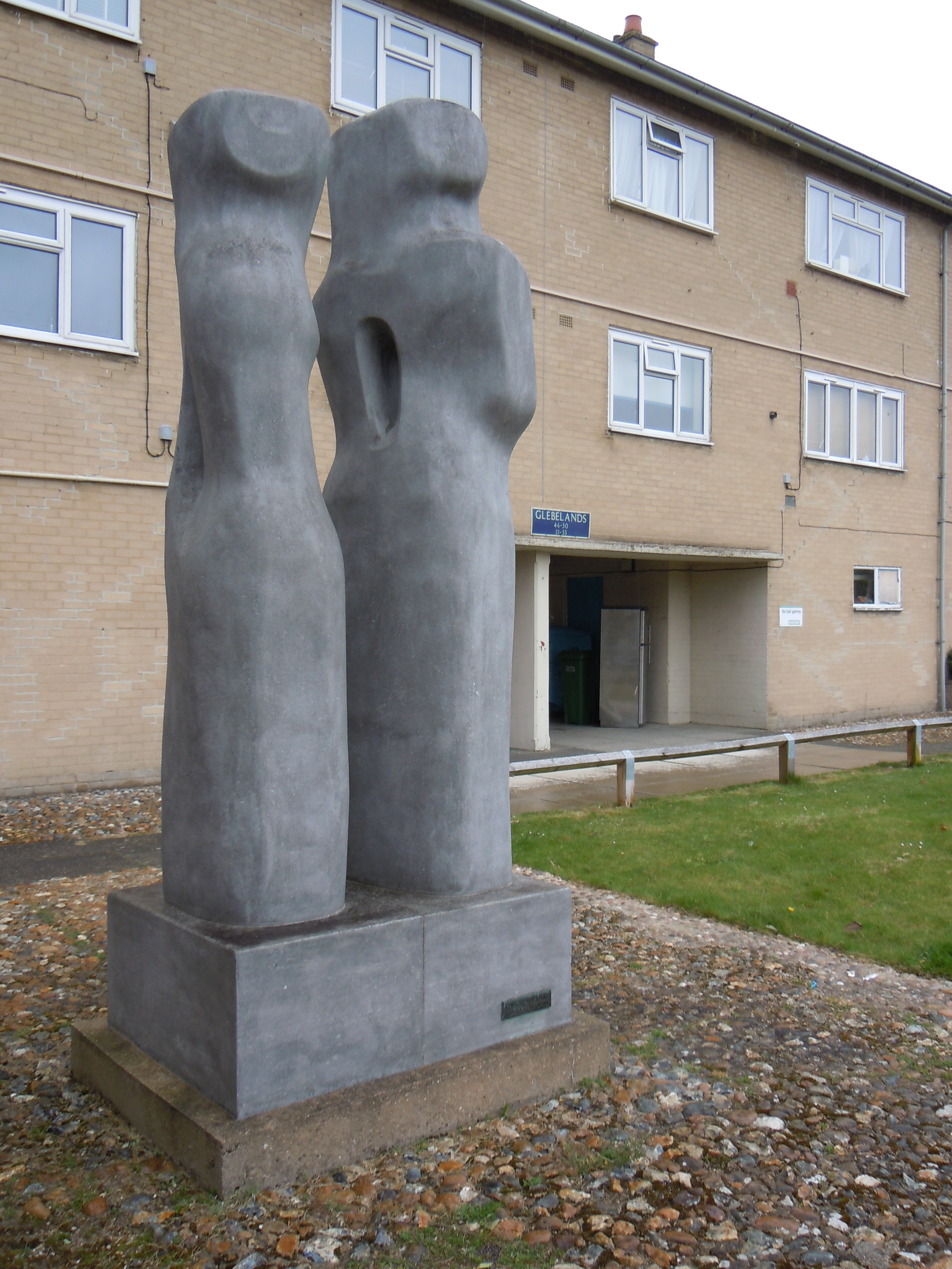 Contrapunctal Forms